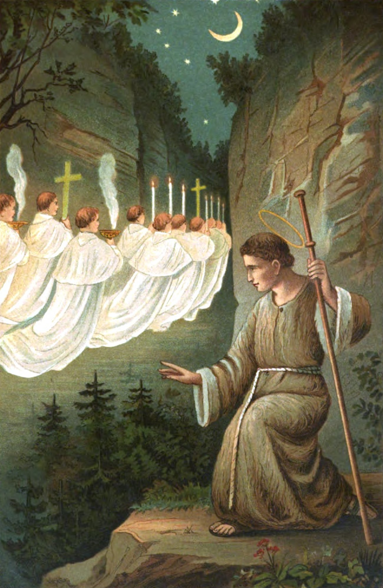 De H. Norbertus in het dal van Prémontré